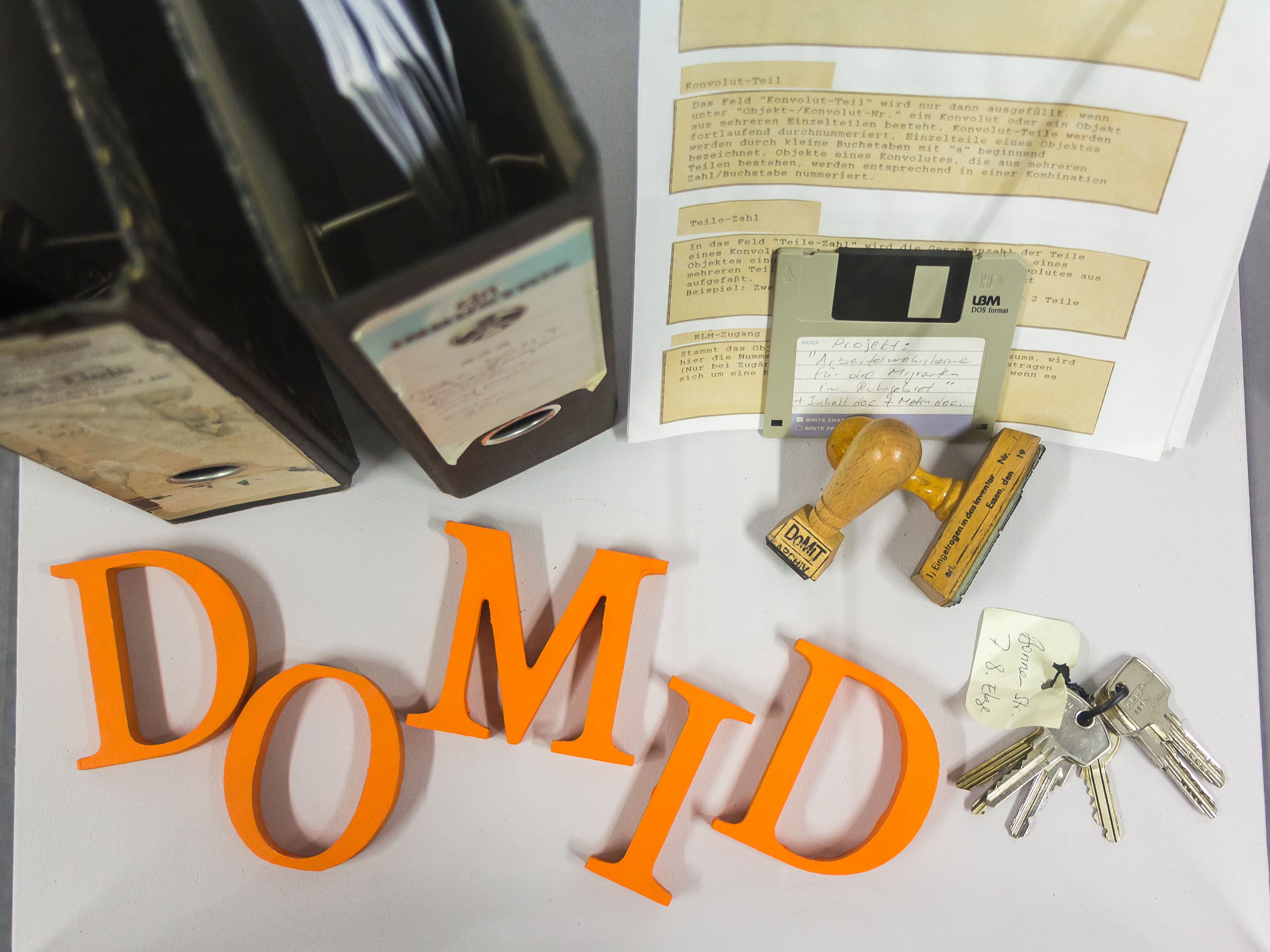 DOMiD, Köln